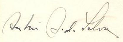 Ilustração minha, meu acervo